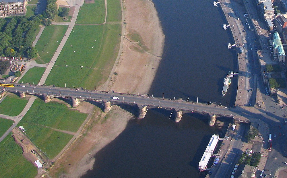 Luftbild Dresden Elbe Neustadt Augustusbrücke Altstadt Brühlsche Terrassen Foto 2008 Wolfgang Pehlemann Wiesbaden IMG_0390.jpg